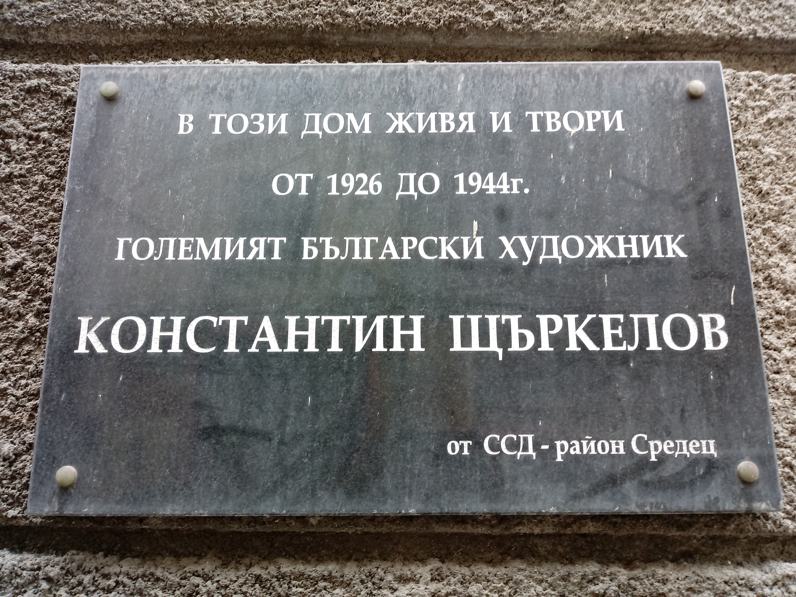 Konstantin Shtarkelov memorial plaque, 6 Aksakov Str., Sofia